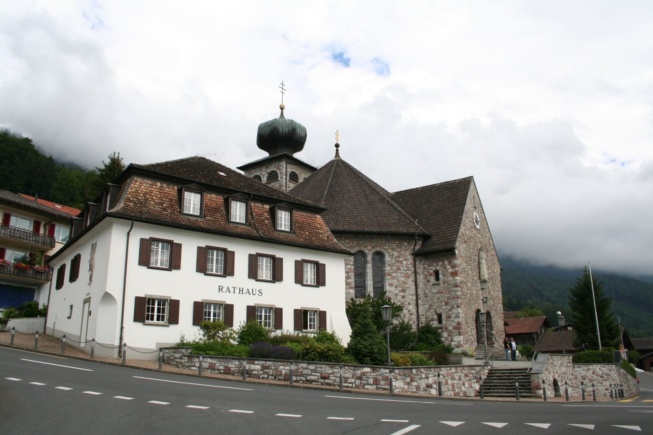 Triesenberg